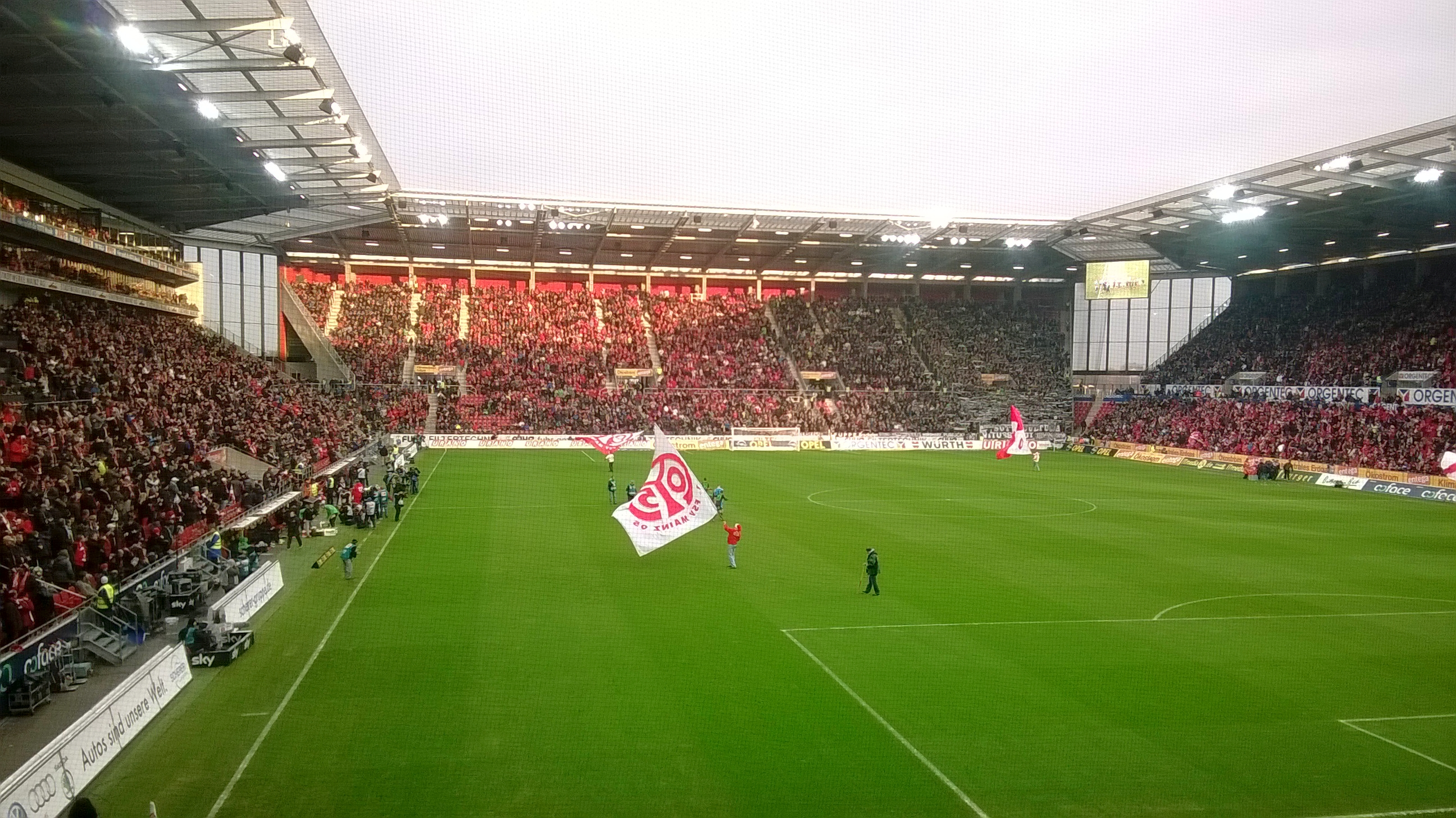 ...vor dem Spiel gegen Borussia M'gladbach (0:0)